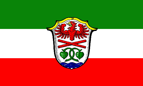 Flagge des Landkreises Miesbach seit dem 23.10.2011.